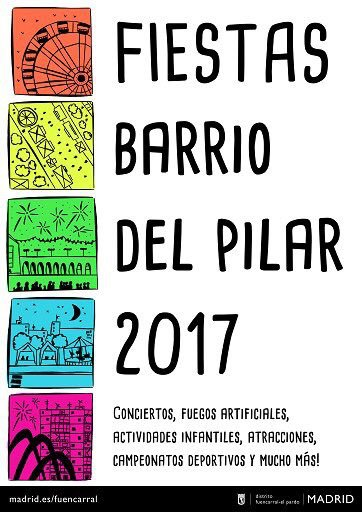 El barrio del Pilar se prepara un año más para vivir la celebración de sus fiestas, de las más populares de la ciudad de Madrid. Este año se extenderán del próximo 11 al 15 de octubre y los festejos, como siempre, se desarrollarán en torno al escenario del parque de La Vaguada, donde tendrán lugar los principales eventos.